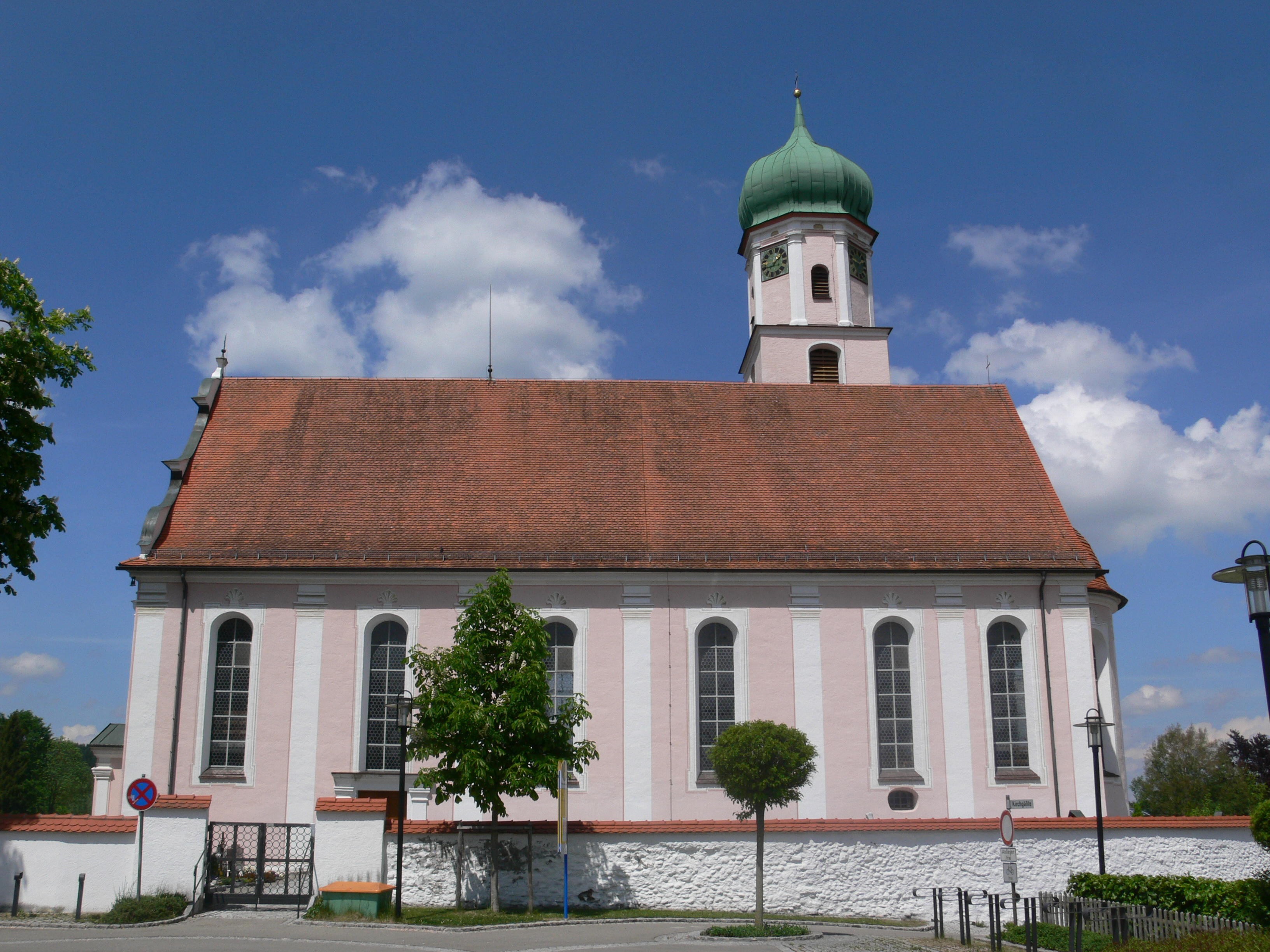 Pfarrkirche St. Gordianus und Epimachus, Aitrach, Landkreis Ravensburg